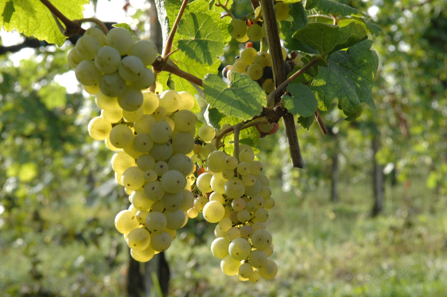 Vitigni autoctoni del Veneto: il Manzoni bianco, Italia.